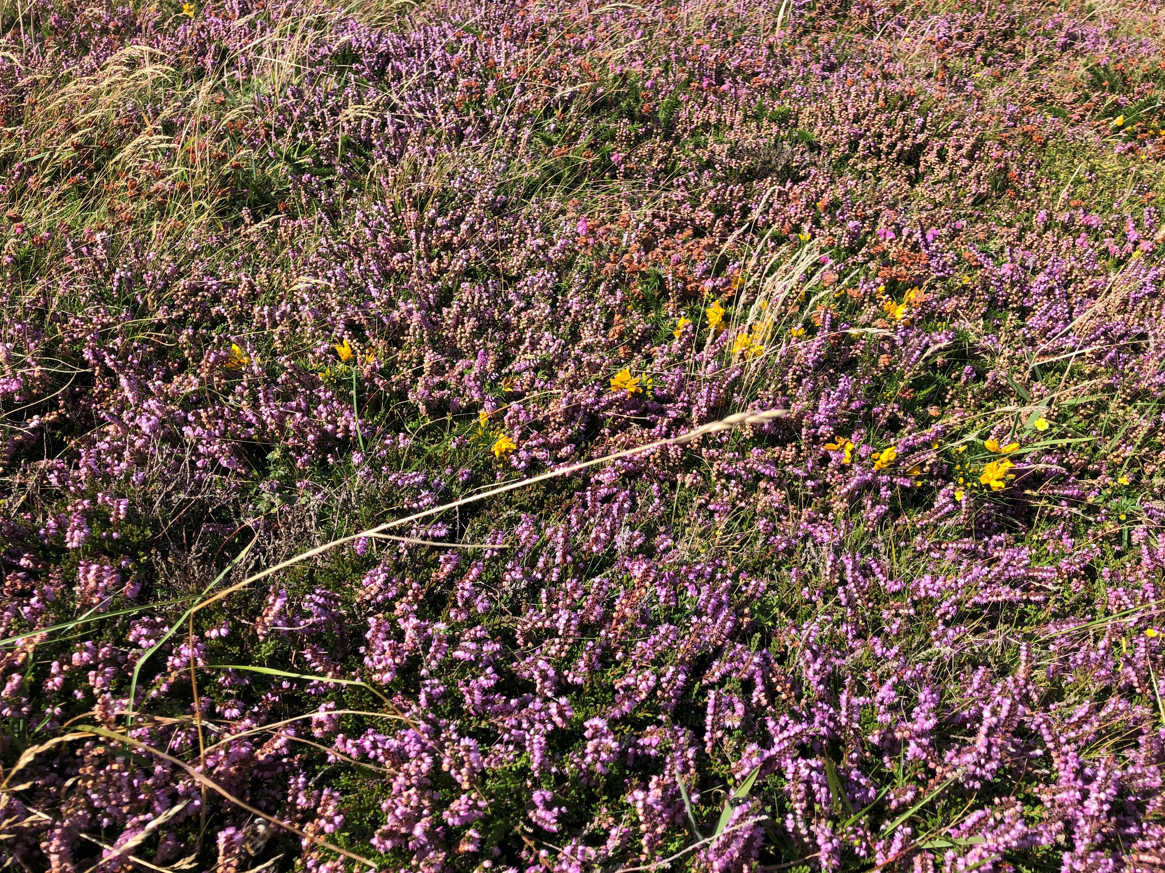 Grug ar hyd ben 'rallt, Porth Ychain.